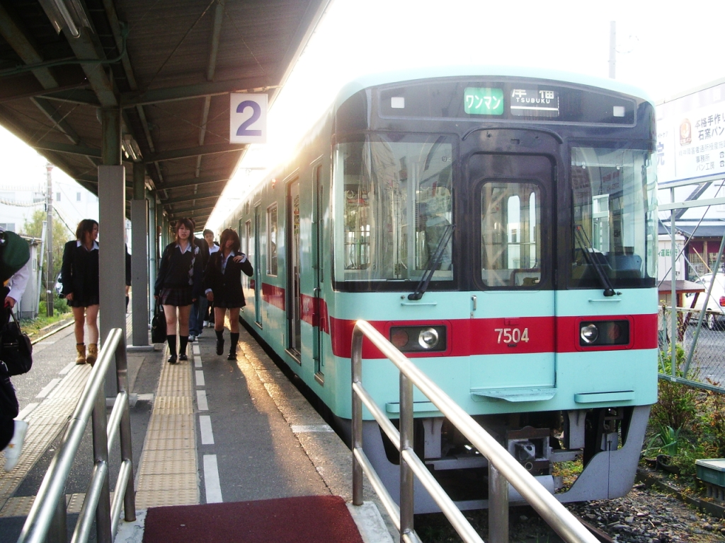 西鉄甘木駅ホームと7000形車両